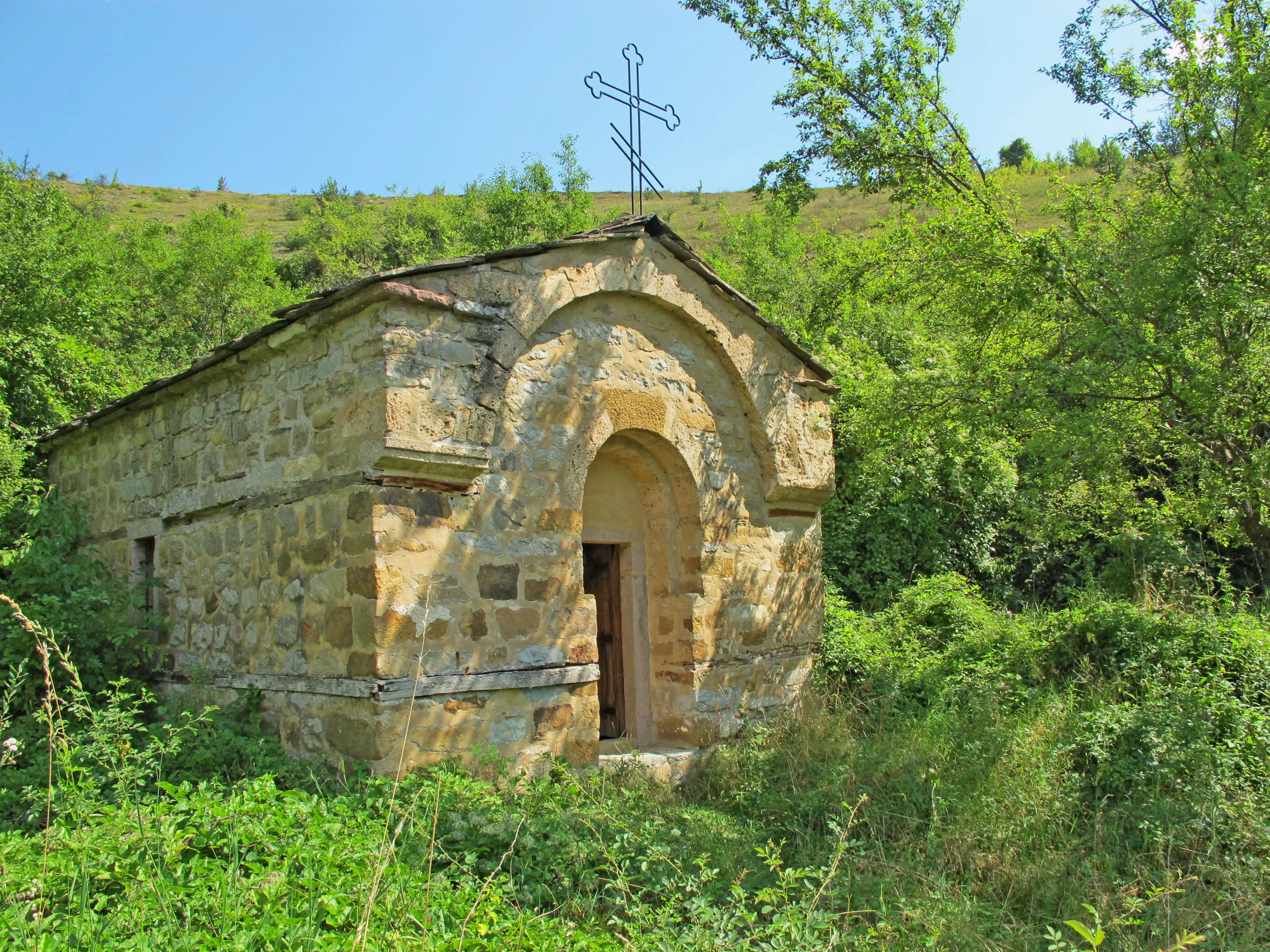 Crkva svetog Arhangela Mihaila u Boljev Dolu kod Dimitrovgrada, na Staroj planini podignuta je oko 1600. godine. Nalazi se maloj udolini, okruzena stenama, pa se moze videti samo iz neposredne blizine.